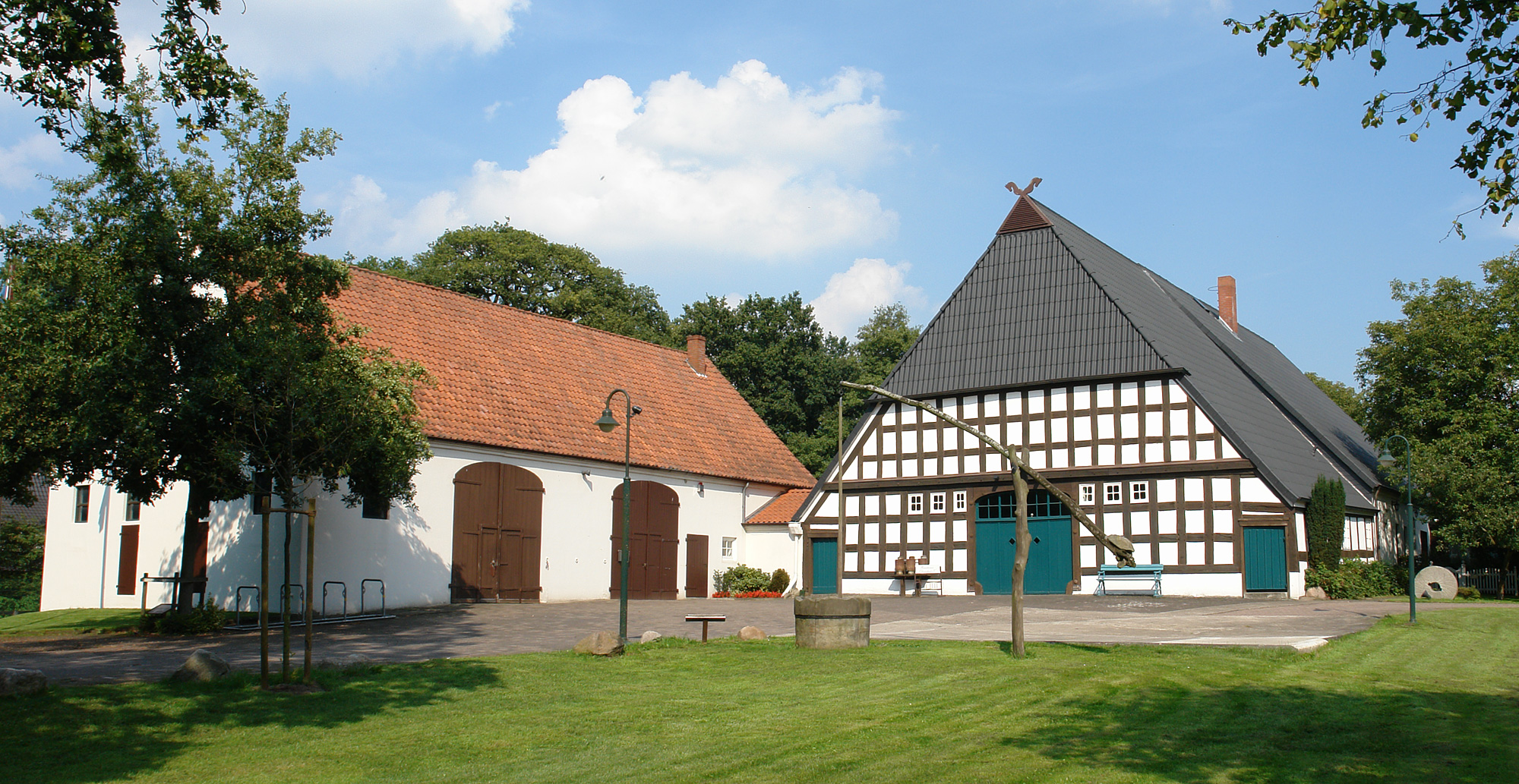 Klatte-Hof in Bremen, Rockwinkeler Heerstraße 123.Das abgebildete Objekt ist ein geschütztes Kulturdenkmal in der Freien Hansestadt Bremen, mit der Nr. 1041 beim Landesamt für Denkmalpflege registriert.